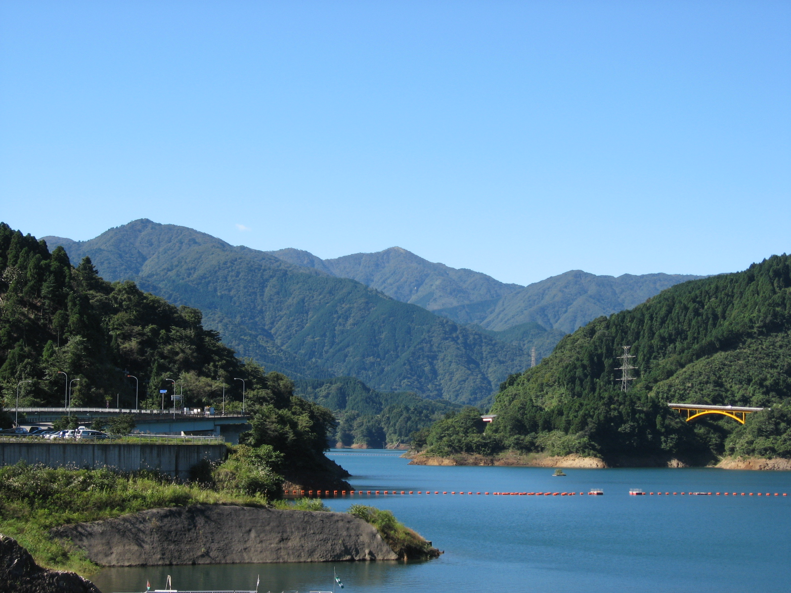 宮ヶ瀬ダム天端から望む蛭ヶ岳